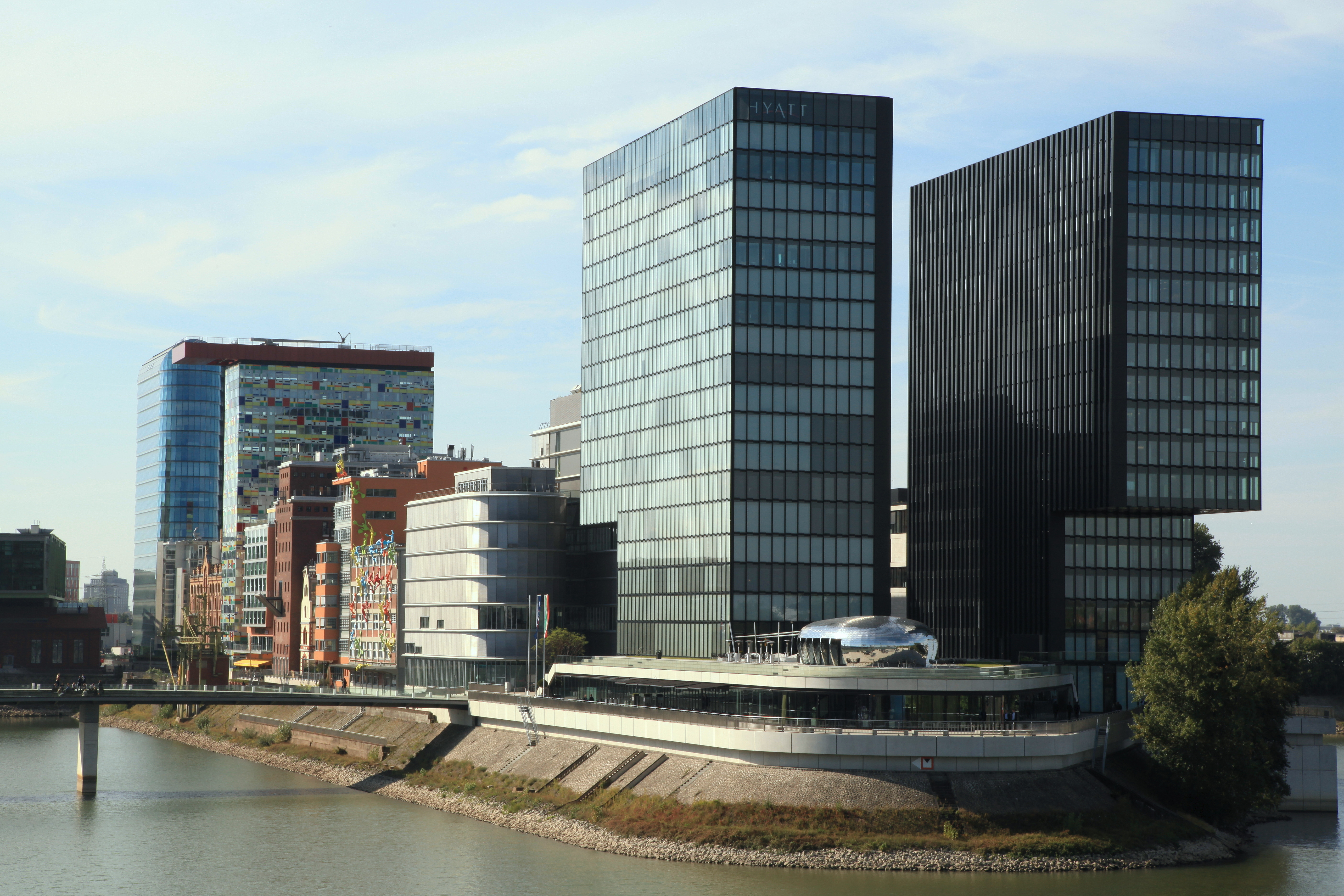 Blick von der Hafenbrücke auf Julo-Levin-Ufer und Hafenspitze in Düsseldorf